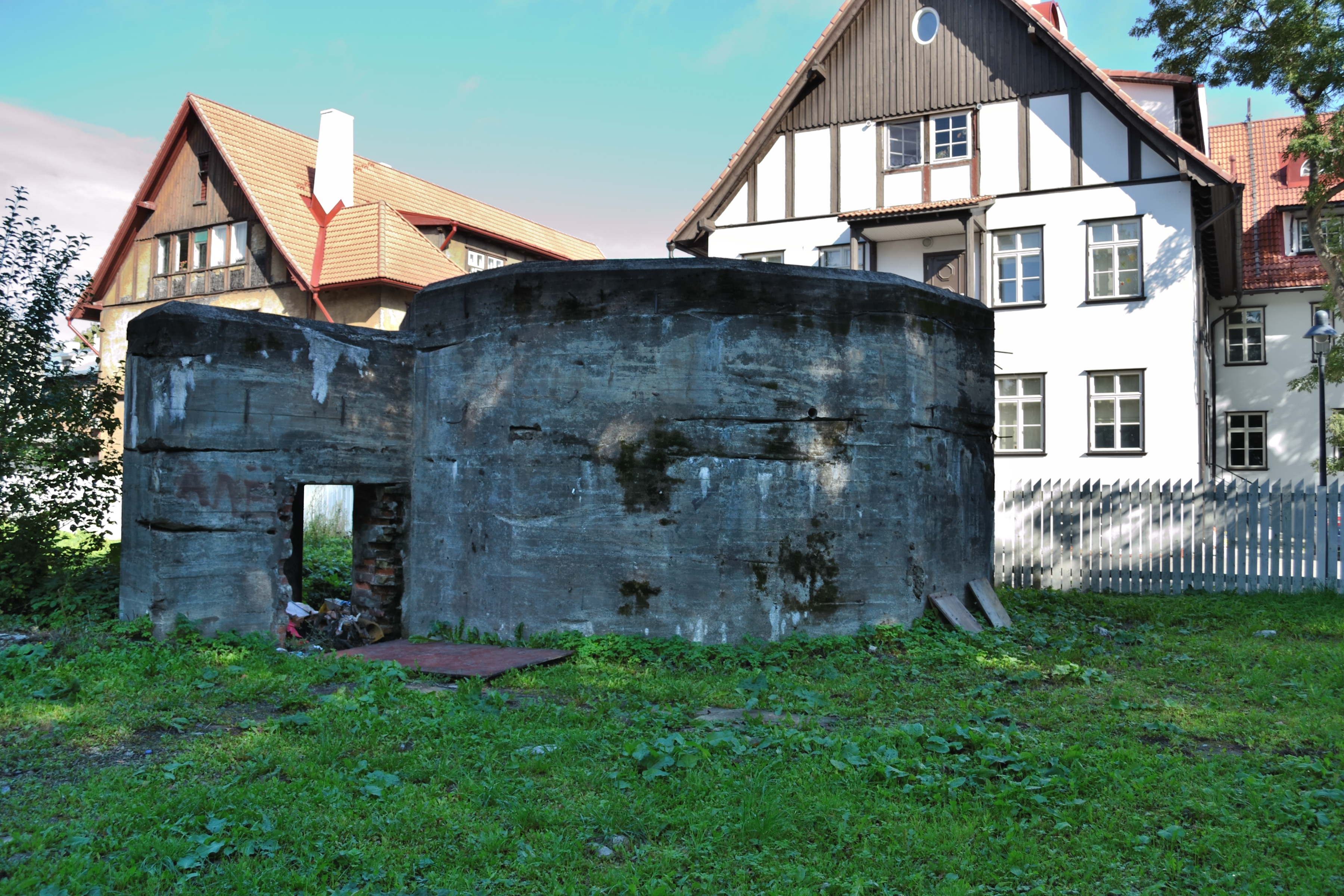 Tallinn, II maailmasõja aegne varjend Tööstuse tn 3, 1941-1944